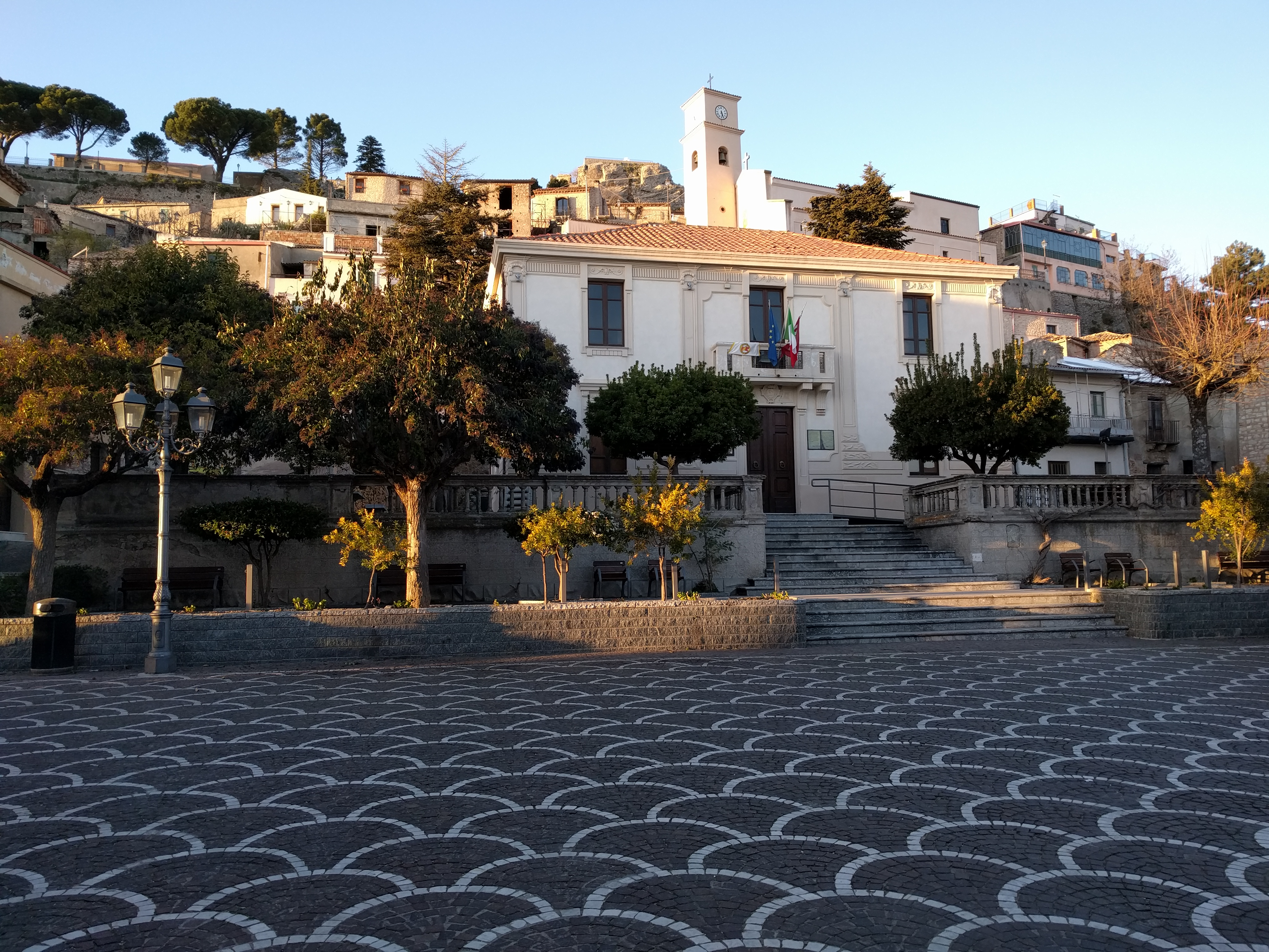 Plaça Roma a Bova